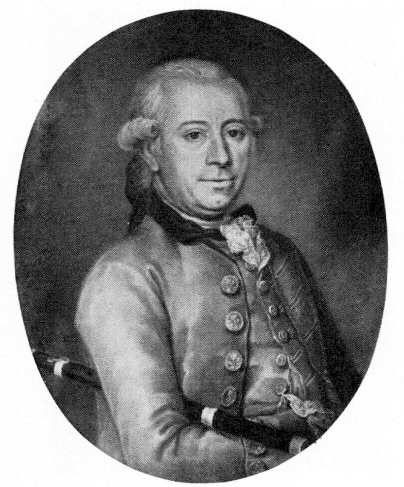 Porträtt föreställande Jean Abraham Grill, Direktör i ostindiska kompaniet.